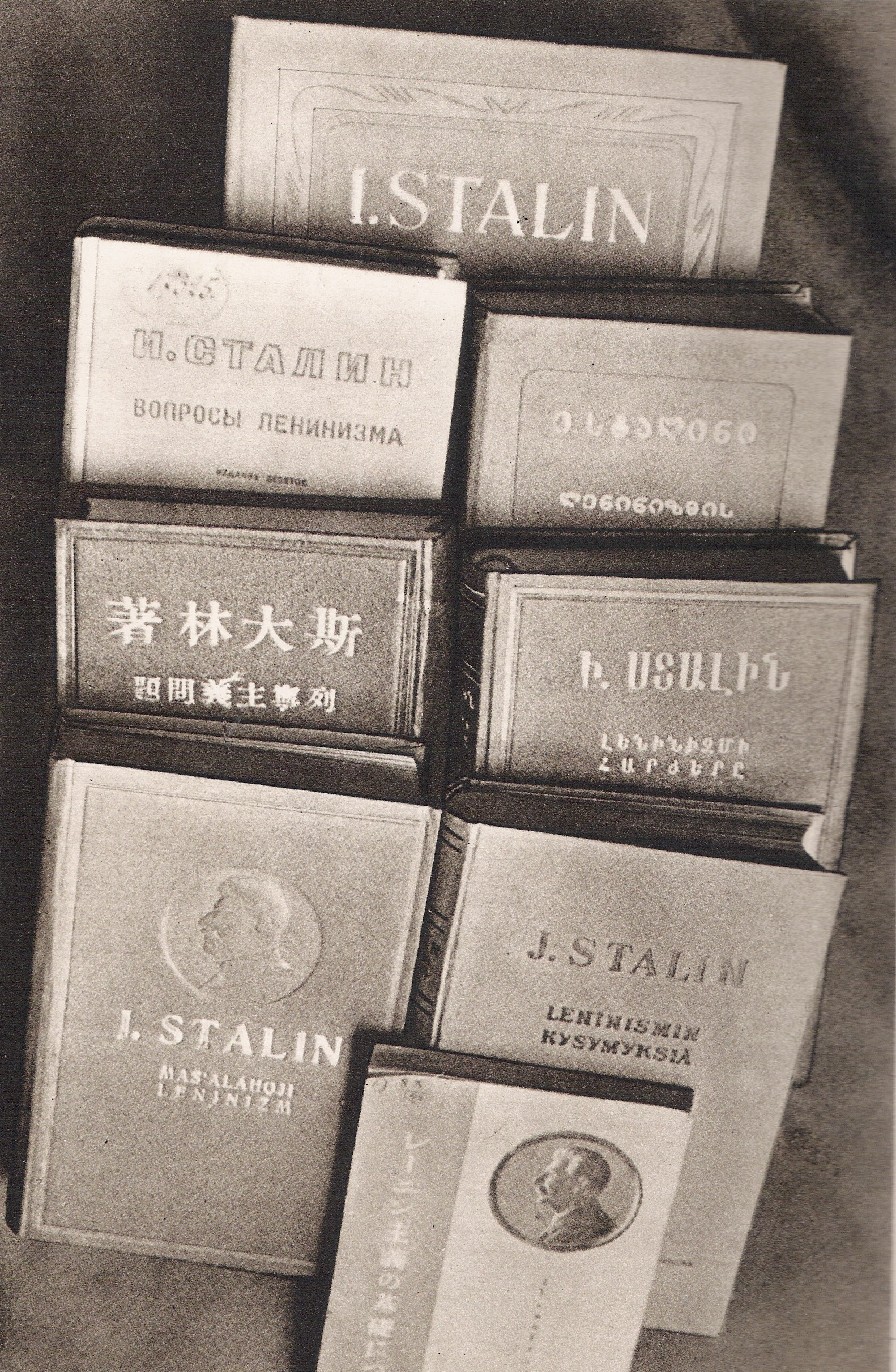 Stalin - Literatura